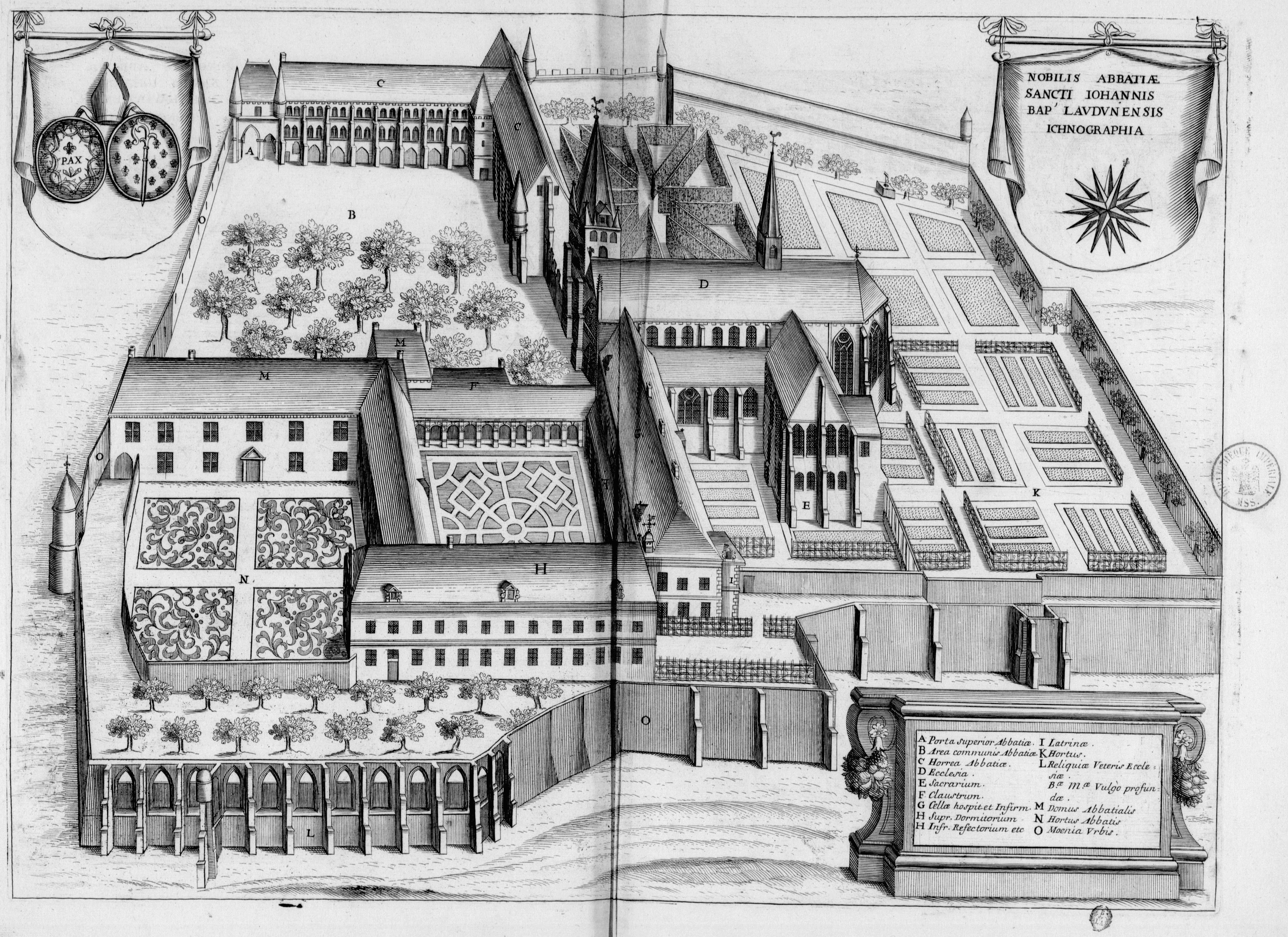 Planche gravée du 17ème siècle représentant l'abbaye Saint-Jean-Baptiste de Laon, dans le livre Monasticon Gallicanum.